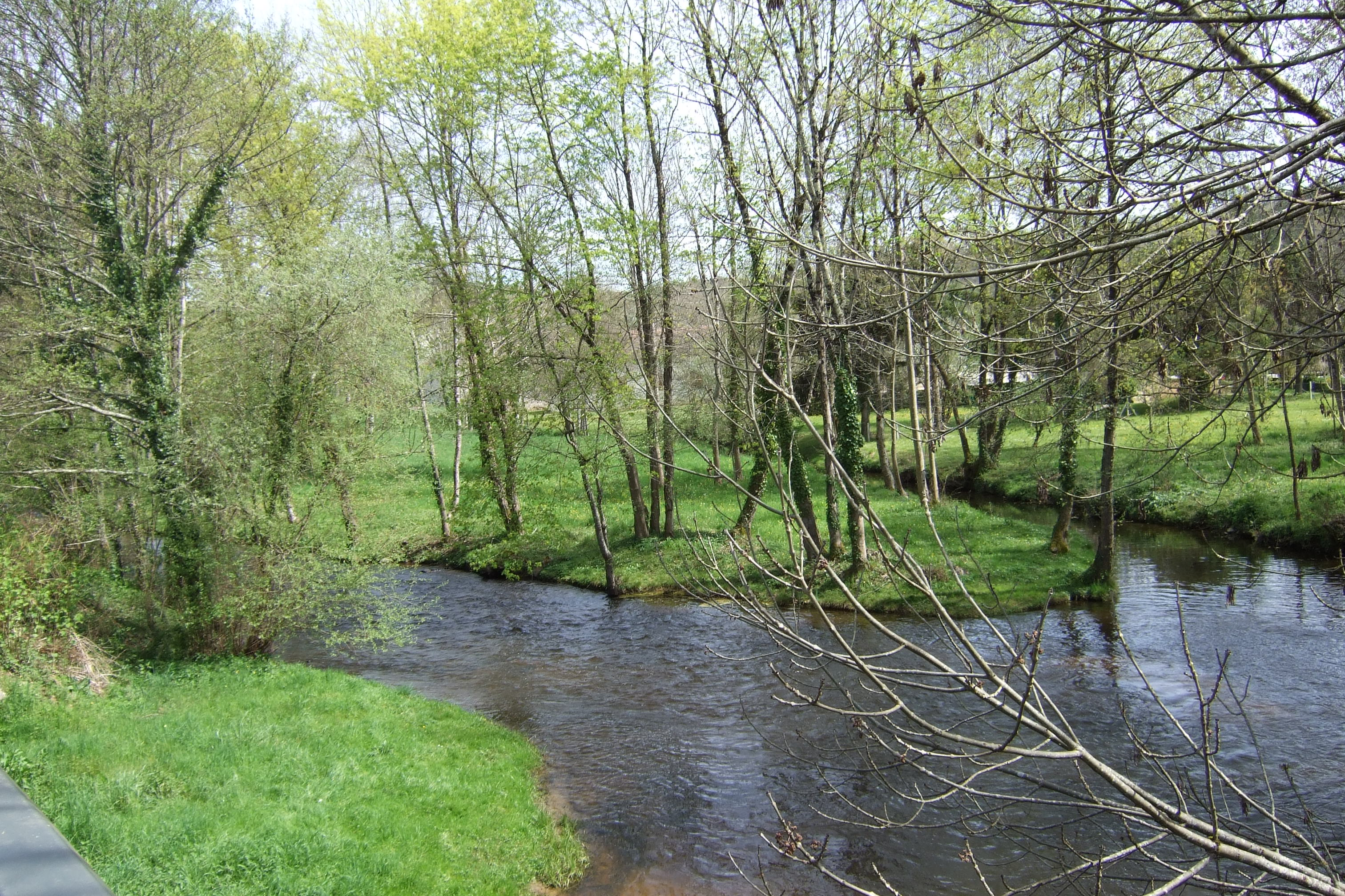 Ville de Saint-Martial de Valette.